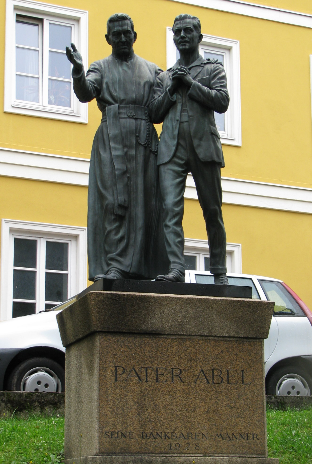 Denkmal für Pater Abel in Mariazell